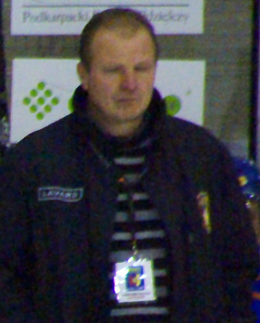 Jacek Szopiński podczas meczu Ciarko KH Sanok - MMKS Podhale Nowy Targ (7:4) 20 marca 2011, Arena Sanok.